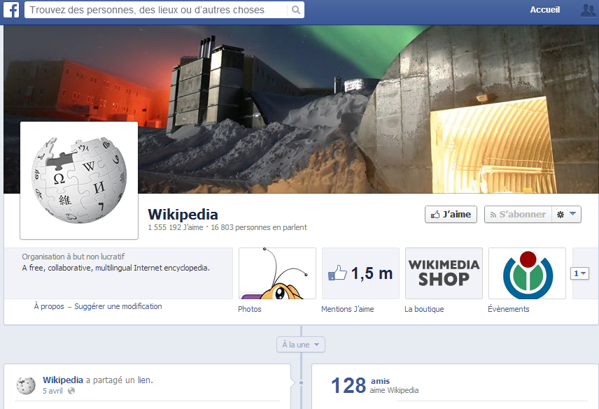 Illustration du nombre de like d'une page facebook